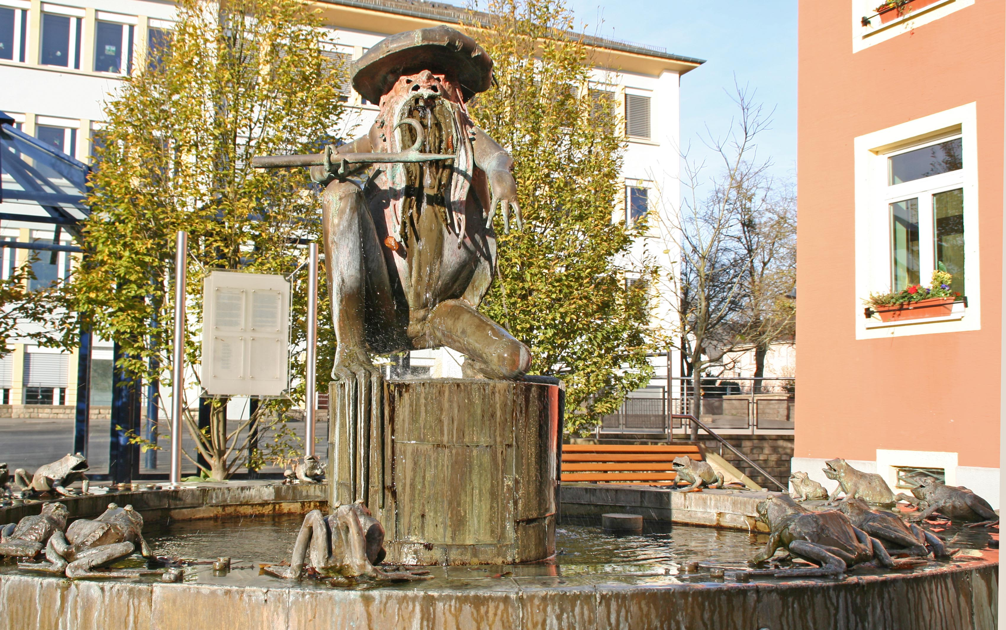 Kropemann-Sprangbur virun der Réidener Gemeng.